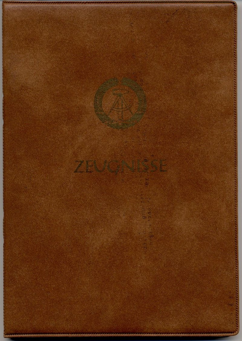 DDR Zeugnismappe aus den 1980er Jahren.